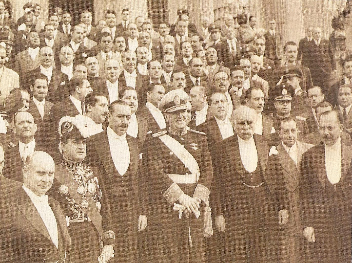 El general Juan Domingo Perón asume la presidencia de Argentina el 4 de junio de 1946. Entre otros lo acompañan su vicepresidente, el radical Hortensio Quijano (izquierda) y Héctor Cámpora (derecha ), presidente en 1973.